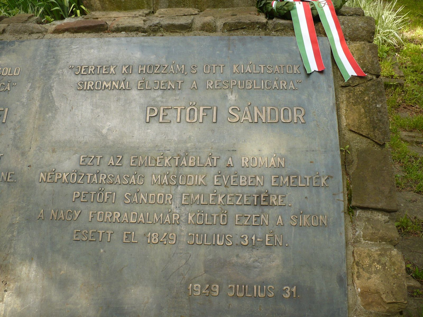 A segesvári csata emlékére emelt obeliszk emléktáblájának magyar nyelvű fele.